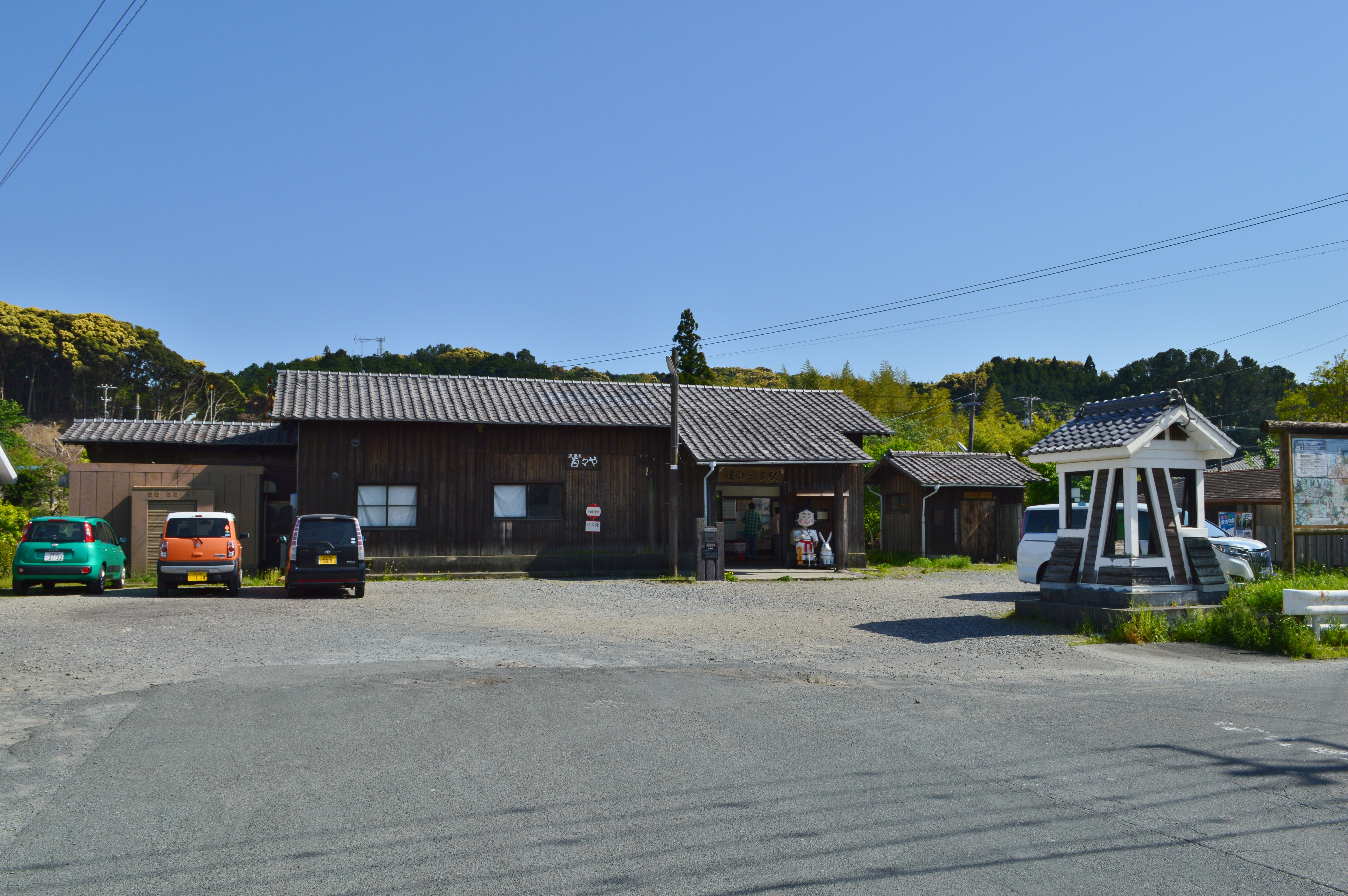 遠江一宮駅 駅舎